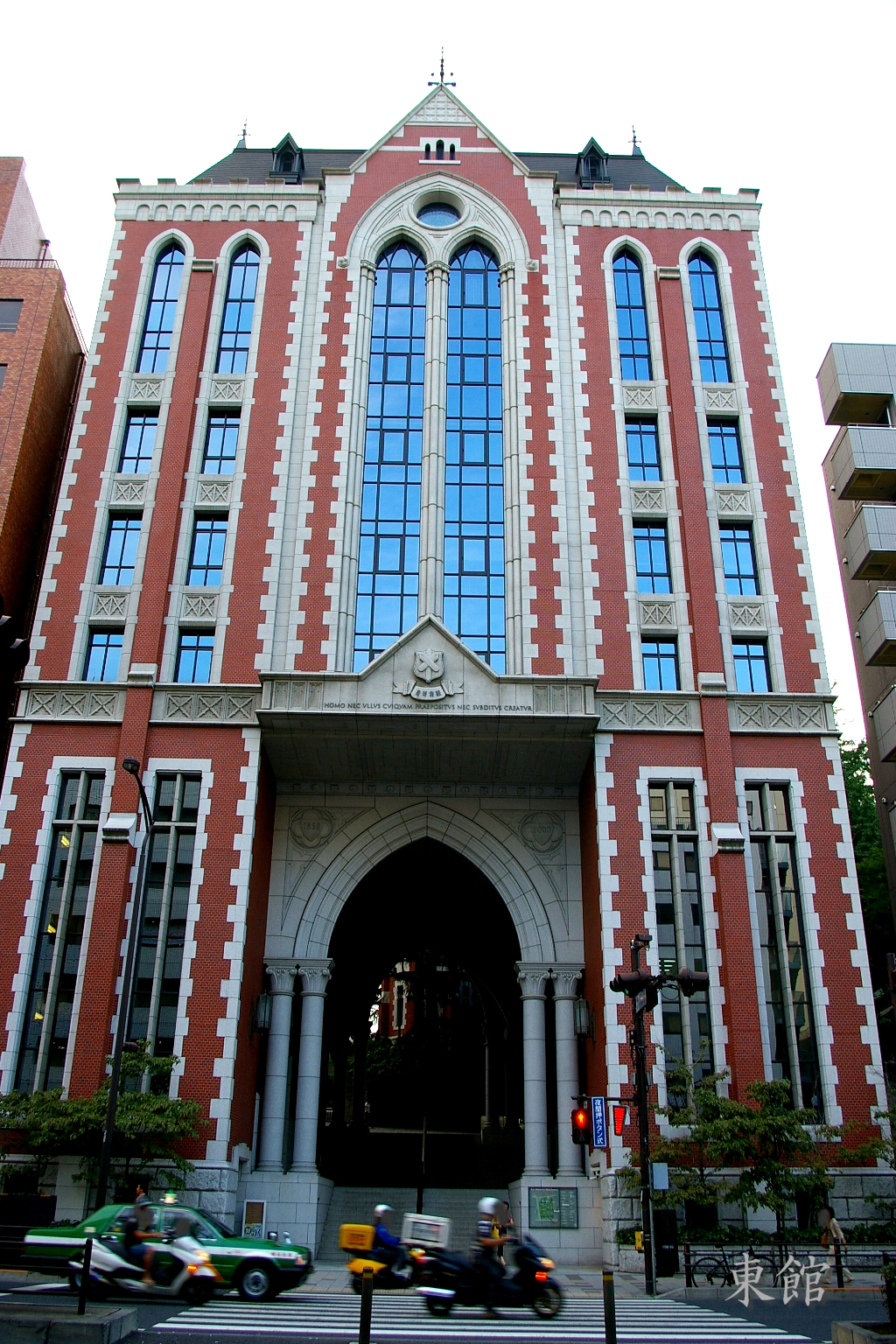 I took it myself in Tokyo.